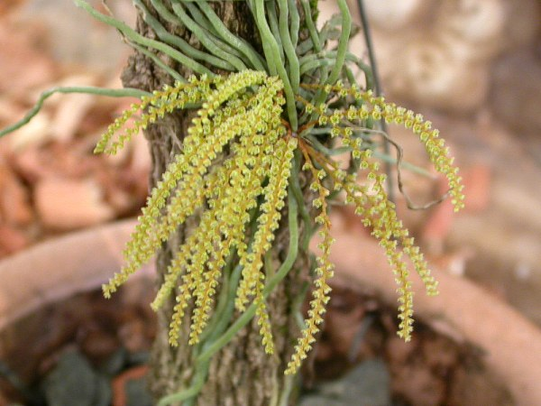 Campylocentrum burchelii